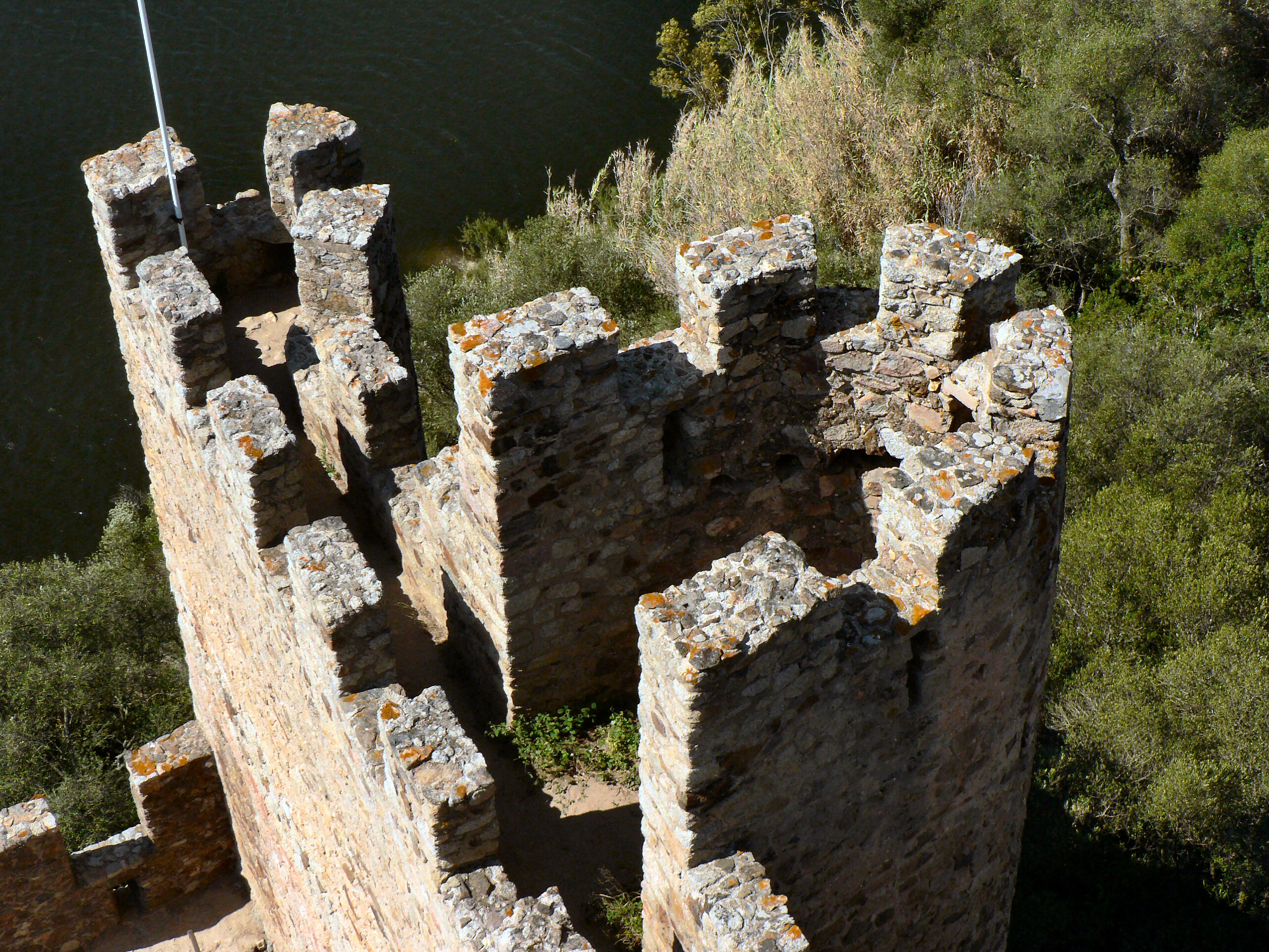 Castelo de Almourol - Pormenor